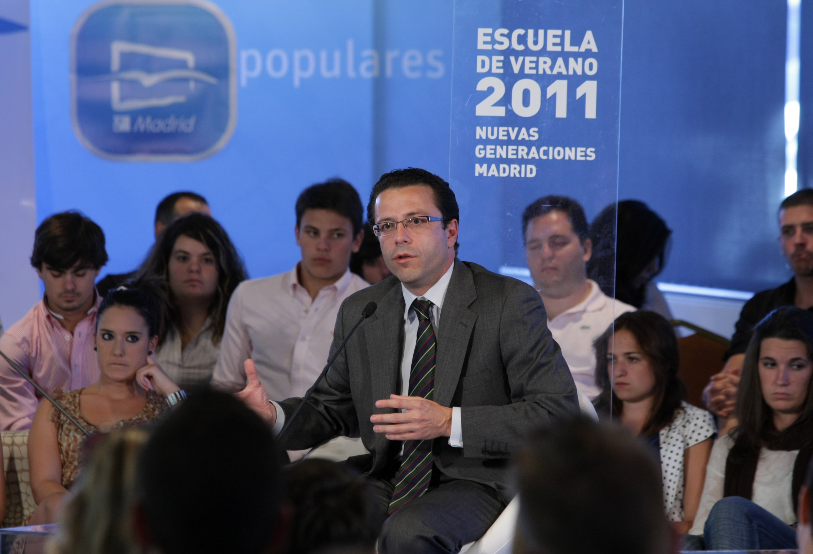 Javier Fernández-Lasquetty en la Escuela de Verano de NNGG del PP de Madrid 2011.